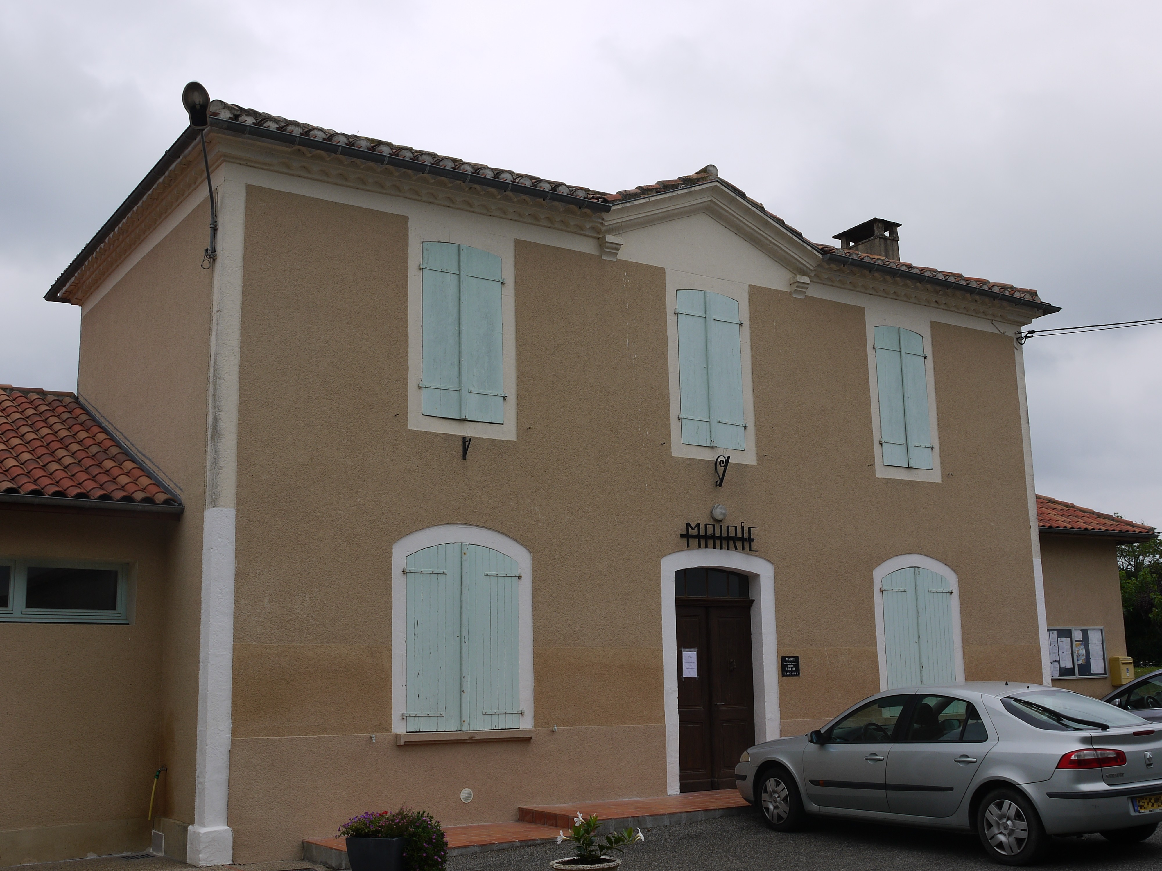 La mairie à Sémézies